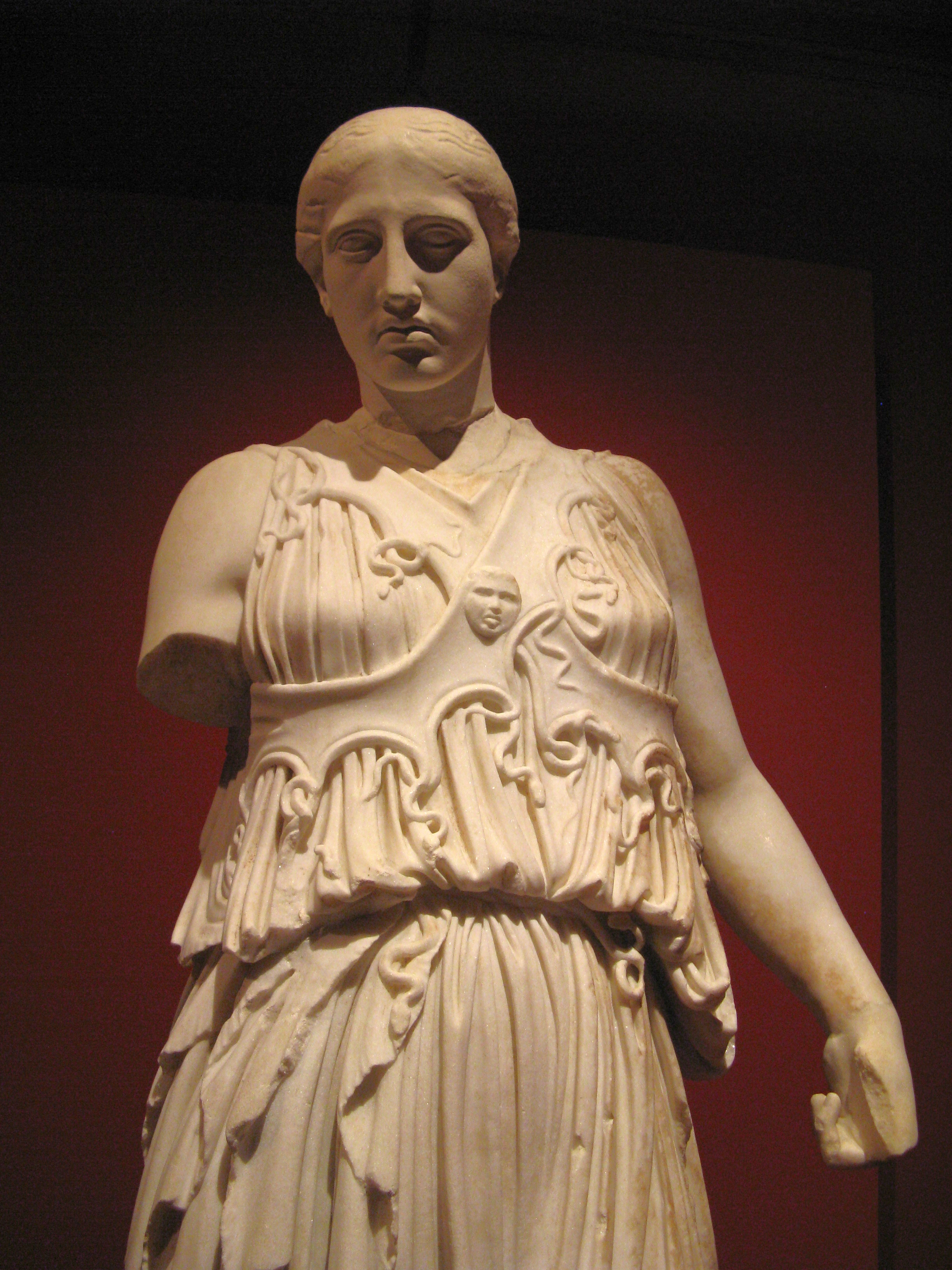 Athena mit der Kreuzbandaegis, geschaffen um 150 v. Chr., 1880 gefunden im Athenaheiligtum von Pergamon, heute in der Antikensammlung Berlin/Pergamonmuseum, Höhe 1,86m